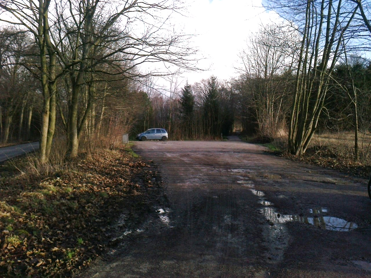 Kig tilbage fra Storskovvej, hvor Constantinsborg trinbræt lå